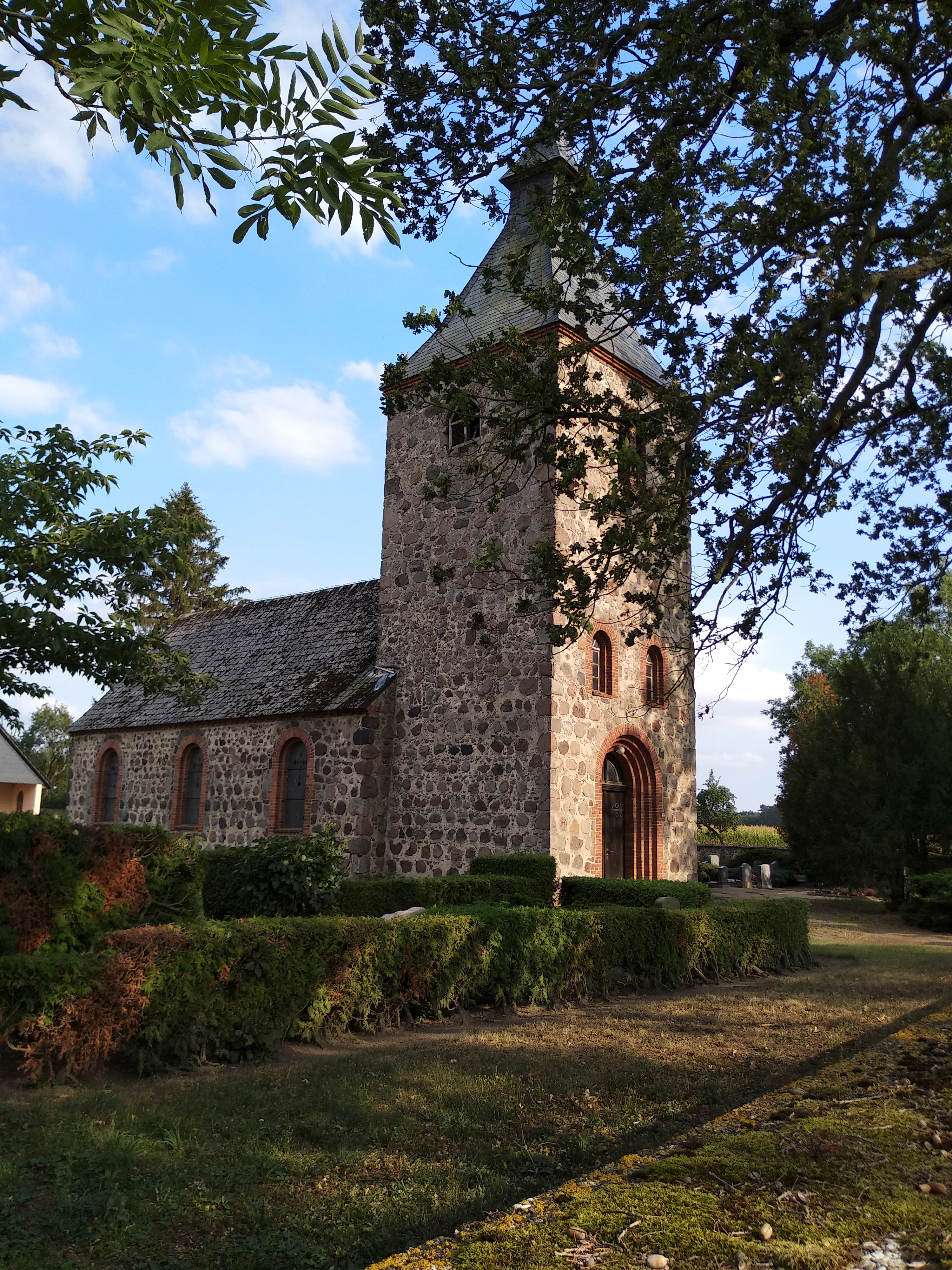 Foto der Kirche zu Ladekath, Seitenansicht